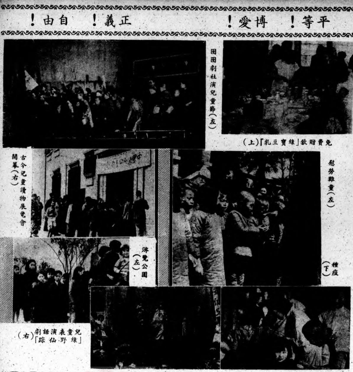 1941年兒童節慰劳难童剪影